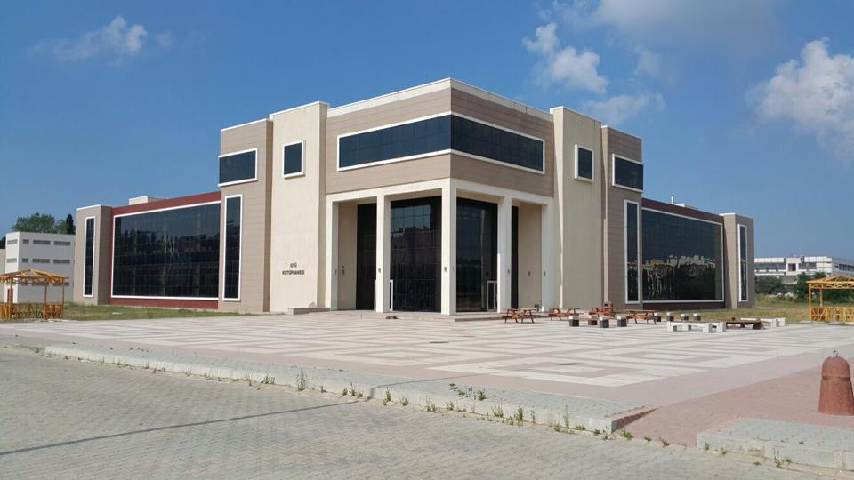 Gebze Teknik Üniversitesi Kütüphanesi.